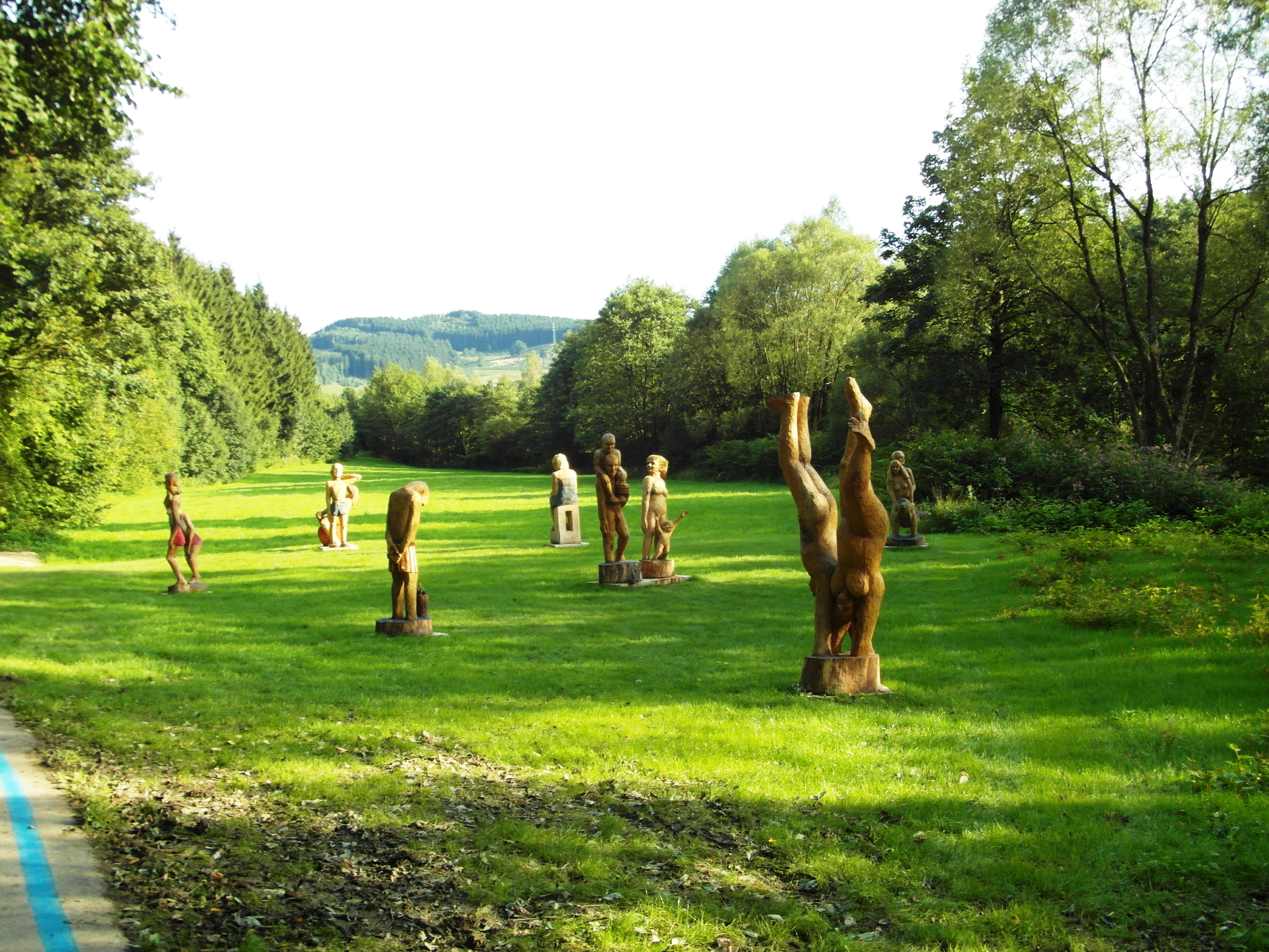 Im August 2015 eröffnete Skulpturenwiese an der Lenne nahe Theten